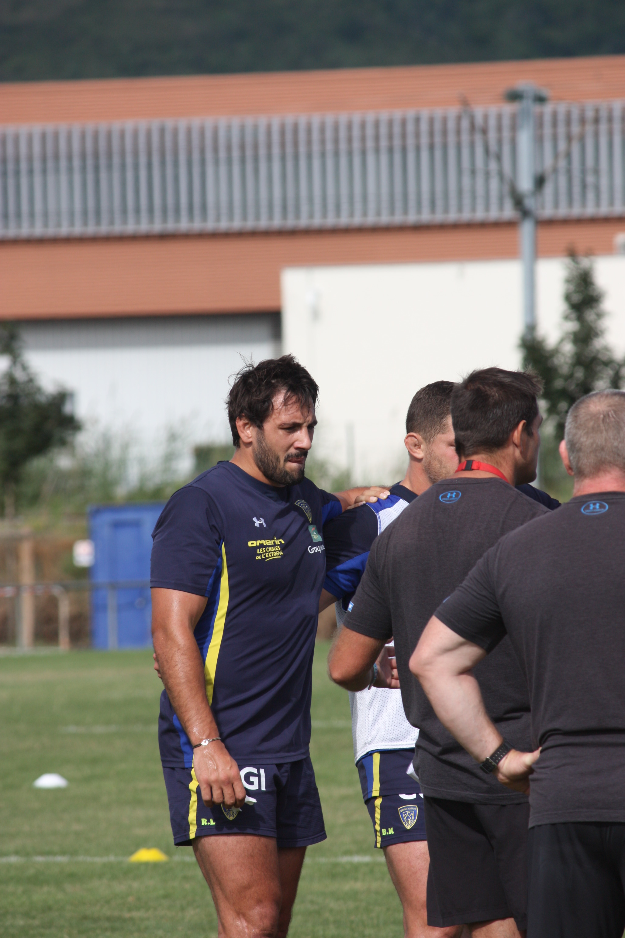 Asm Clermont